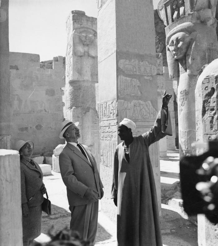 Ägypten, Besuch Walter Ulbricht Zentralbild/Kohls 27.2.1965 Radiofoto Staatsbesuch Walter Ulbrichts in der VAR [Vereinigte Arabische Republik Ägypten], Luxor: Walter Ulbricht in Luxor. Die 30 000 Einwohner von Luxor, der Stadt auf dem Boden des anthiken Thebens, empfingen den Vorsitzenden des Staatsrates der DDR, Walter Ulbricht, und seine Begleitung am 26. Februar mit großer Begeisterung. Tief beeindruckt waren die Gäste aus der DDR von den antiken Kultur-Denkmälern, die sie auf dem westlichen Nilufer besichtigten. UBz: Ein Araber gibt dem Staatsratsvorsitzenden Walter Ulbricht (links) Erläuterungen im Tal der Könige. Abgebildete Personen: Ulbricht, Walter: Staatsratsvorsitzender, Erster Sekretär des Zentralkomitees (ZK) der SED, Vorsitzender des Nationalen Verteidigungsrates, DDR (GND 118625179)